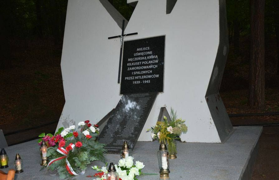 Brzezinki - pomnik ofiar polskich zamordowanych i spalonych przez Niemców podczas okupacji Polski jesienią 1939 (Egzekucje w lesie Birkenek – masowe egzekucje mieszkańców Ziemi Michałowskiej przeprowadzane przez okupantów niemieckich w lesie koło majątku Birkenek. Jesienią 1939 członkowie paramilitarnego Selbstschutzu i funkcjonariusze policji niemieckiej zamordowali tam blisko 400 mieszkańców Brodnicy i okolicznych miejscowości.)